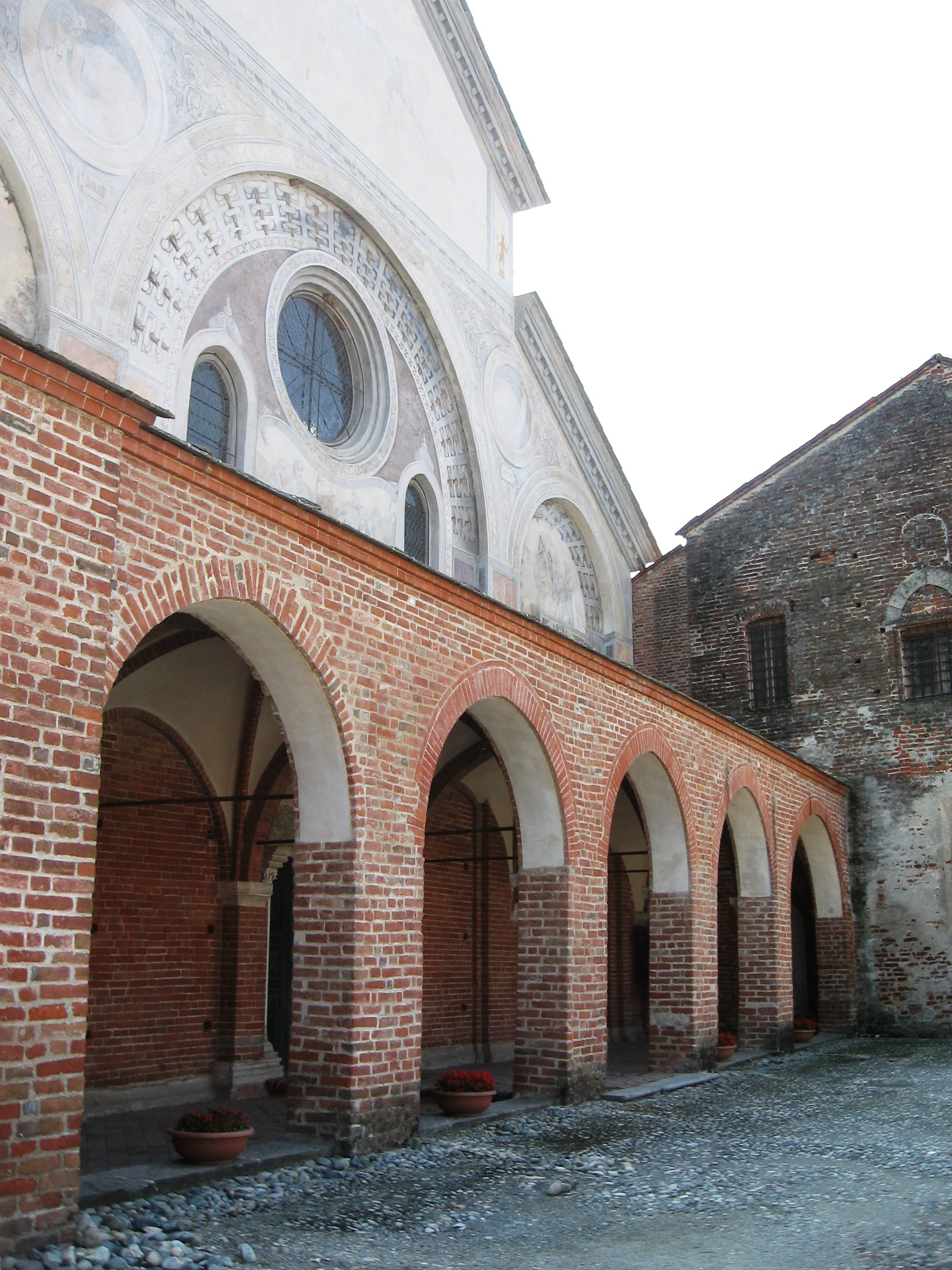 Revello. Cuneo. La facciata dell'Abbazia cistercense di Staffarda. Secolo XII e seguenti.